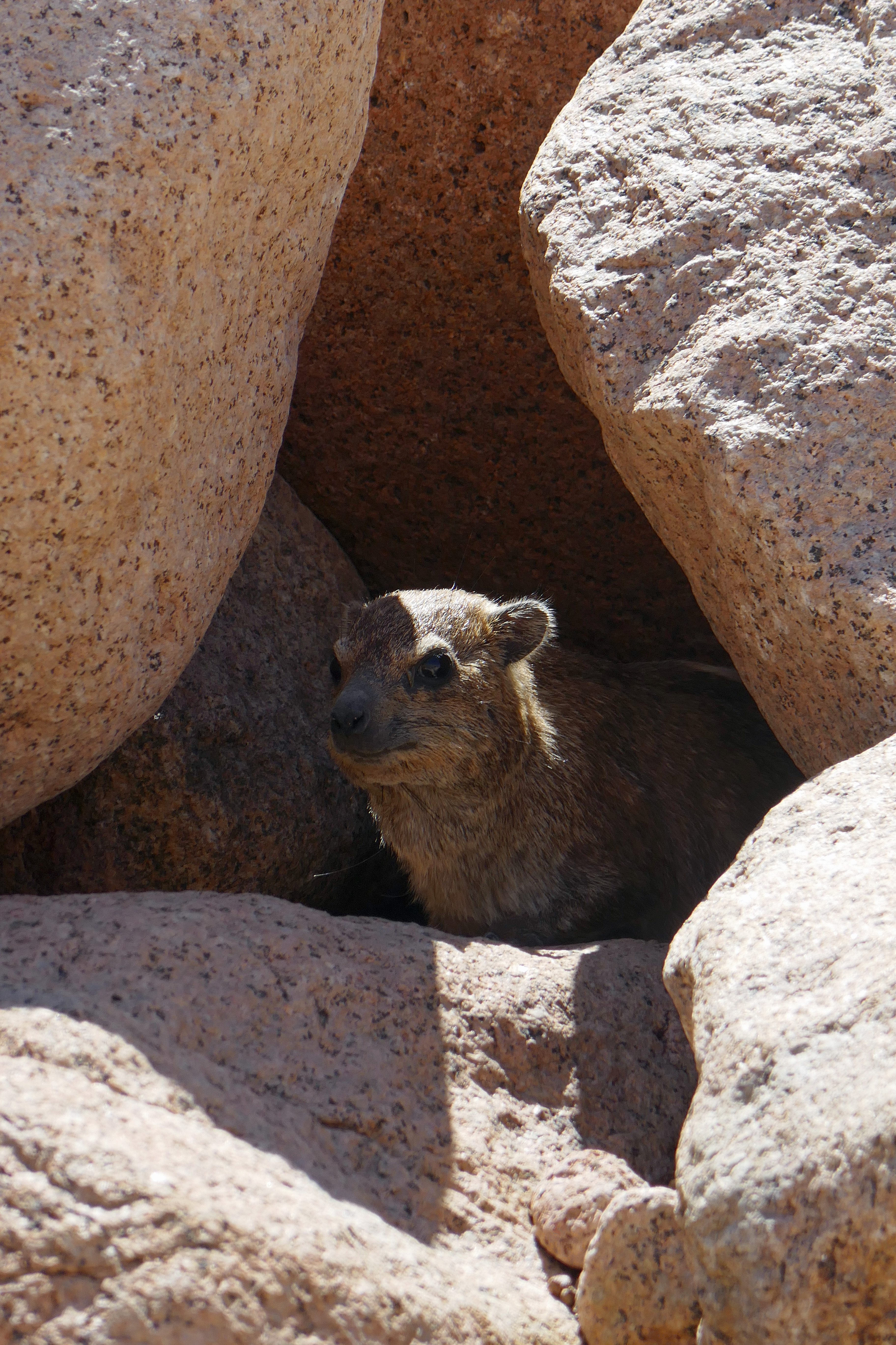 Procavia capensis (rock dassie) dans le massif du Brandberg en Namibie.